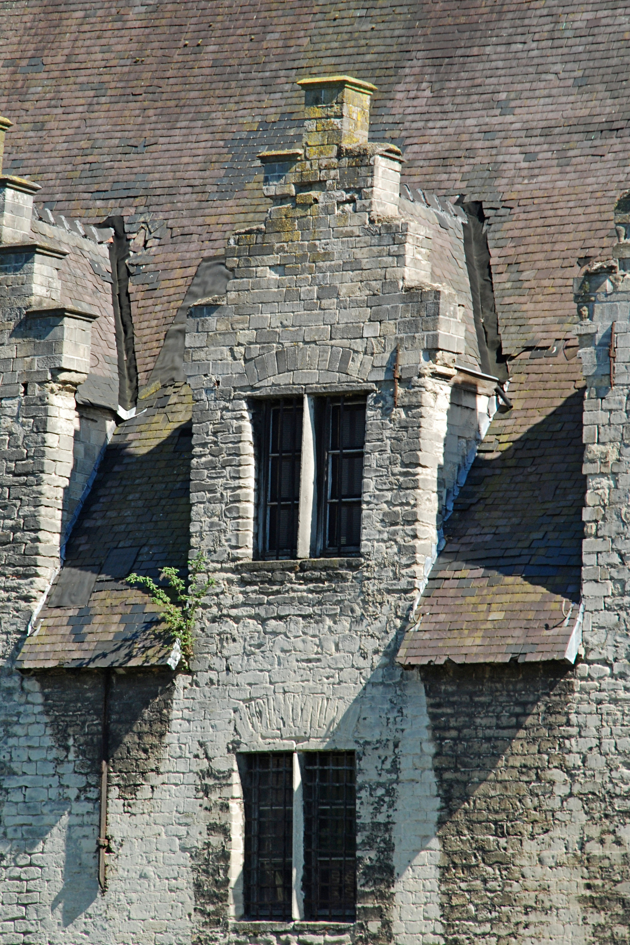 Belgique - Gand - Grande Boucherie (Groot Vleeshuis 1407-1419)